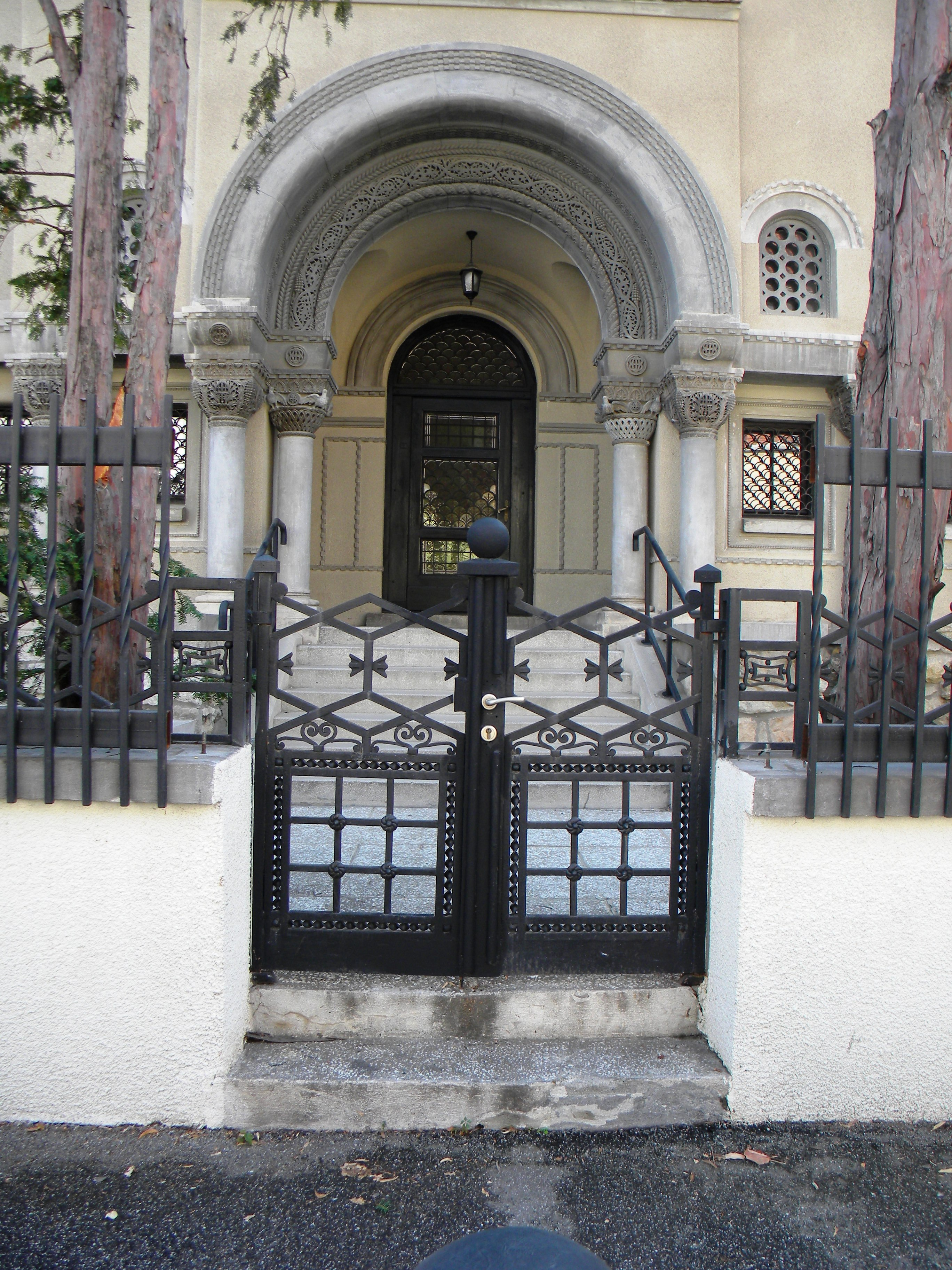 Casa pe Str. Dumbrava Rosie nr. 10, Bucuresti sect. 2(detaliu 2)